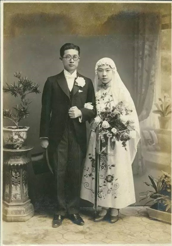 葉榮鐘與施纖纖女士在鹿港結婚之紀念照